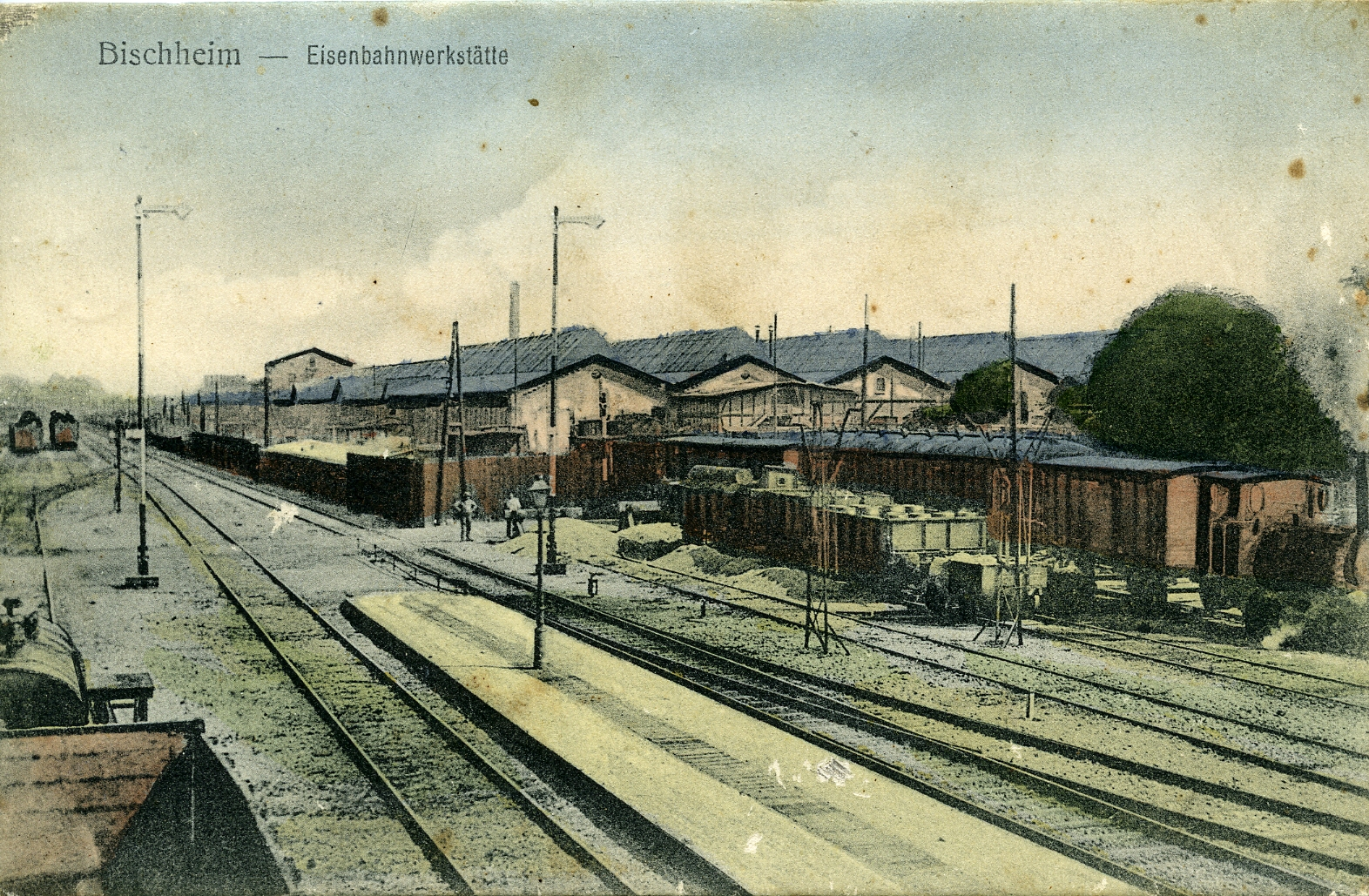 Les ateliers de réparation du chemin de fer en 1915 - Collection Ville de Bischheim